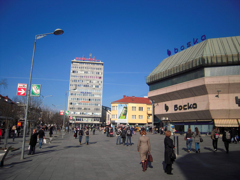 Трг_Крајине